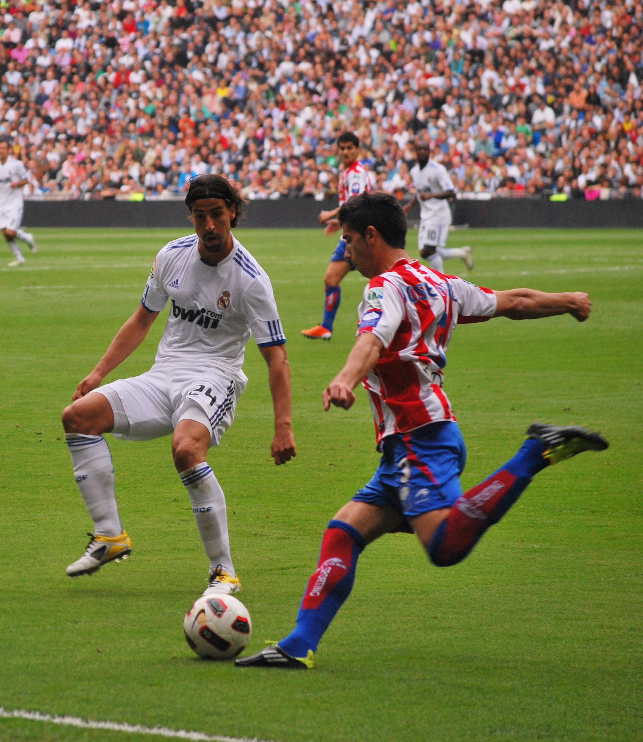 Khedira